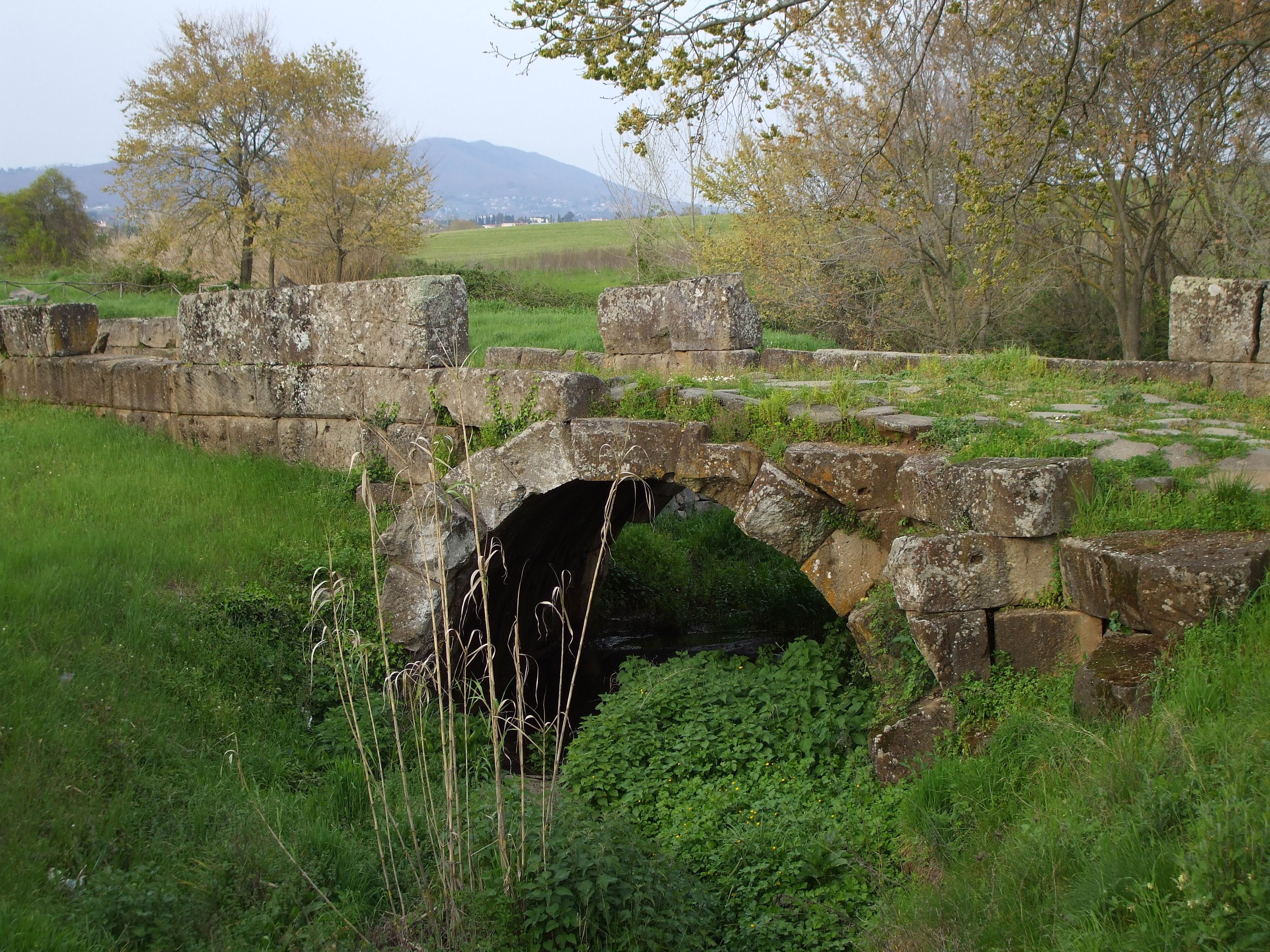 Lanuvio, il ponte Loreto ed il Monte Artemisio